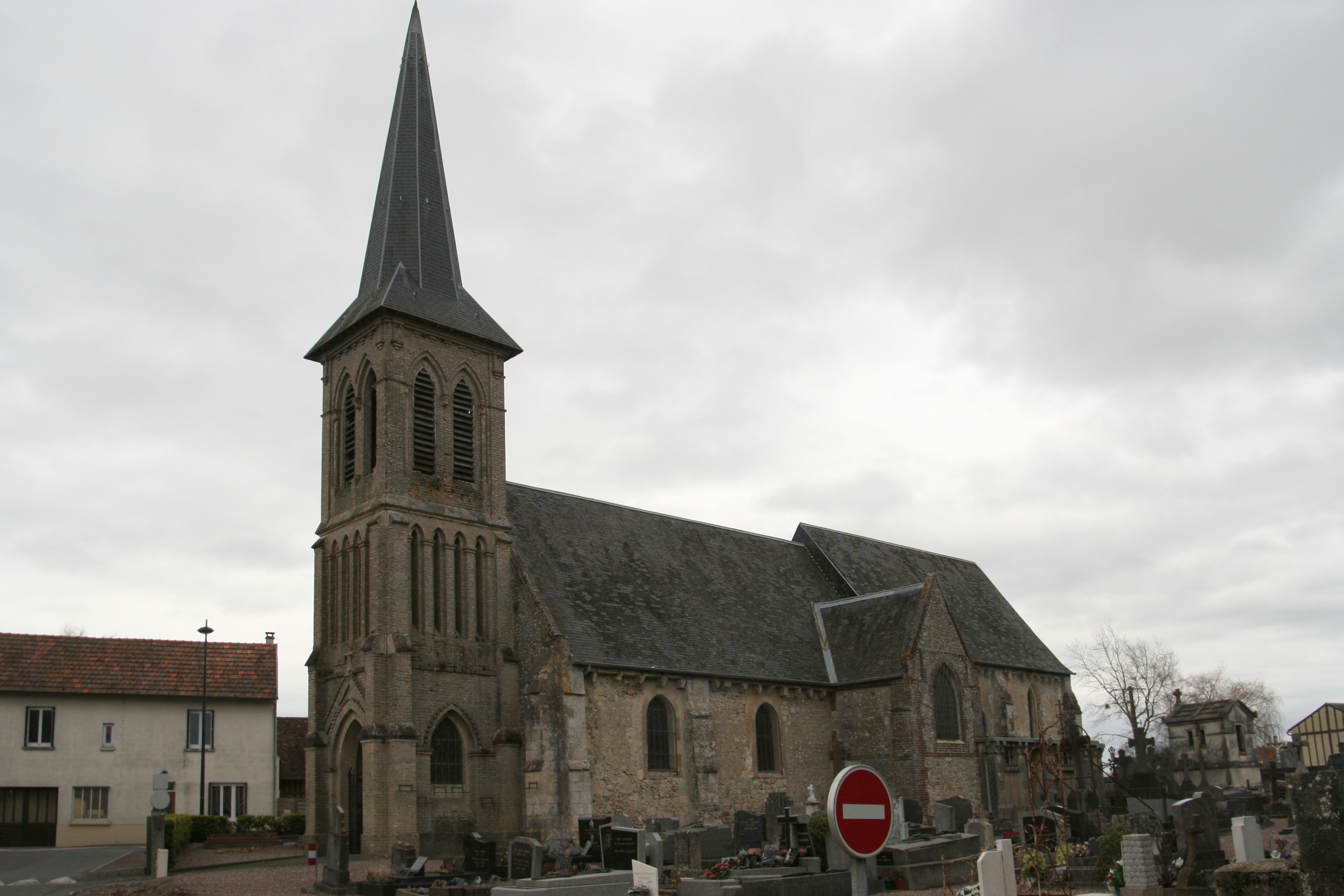 Église Saint-Remy d'Annebault.